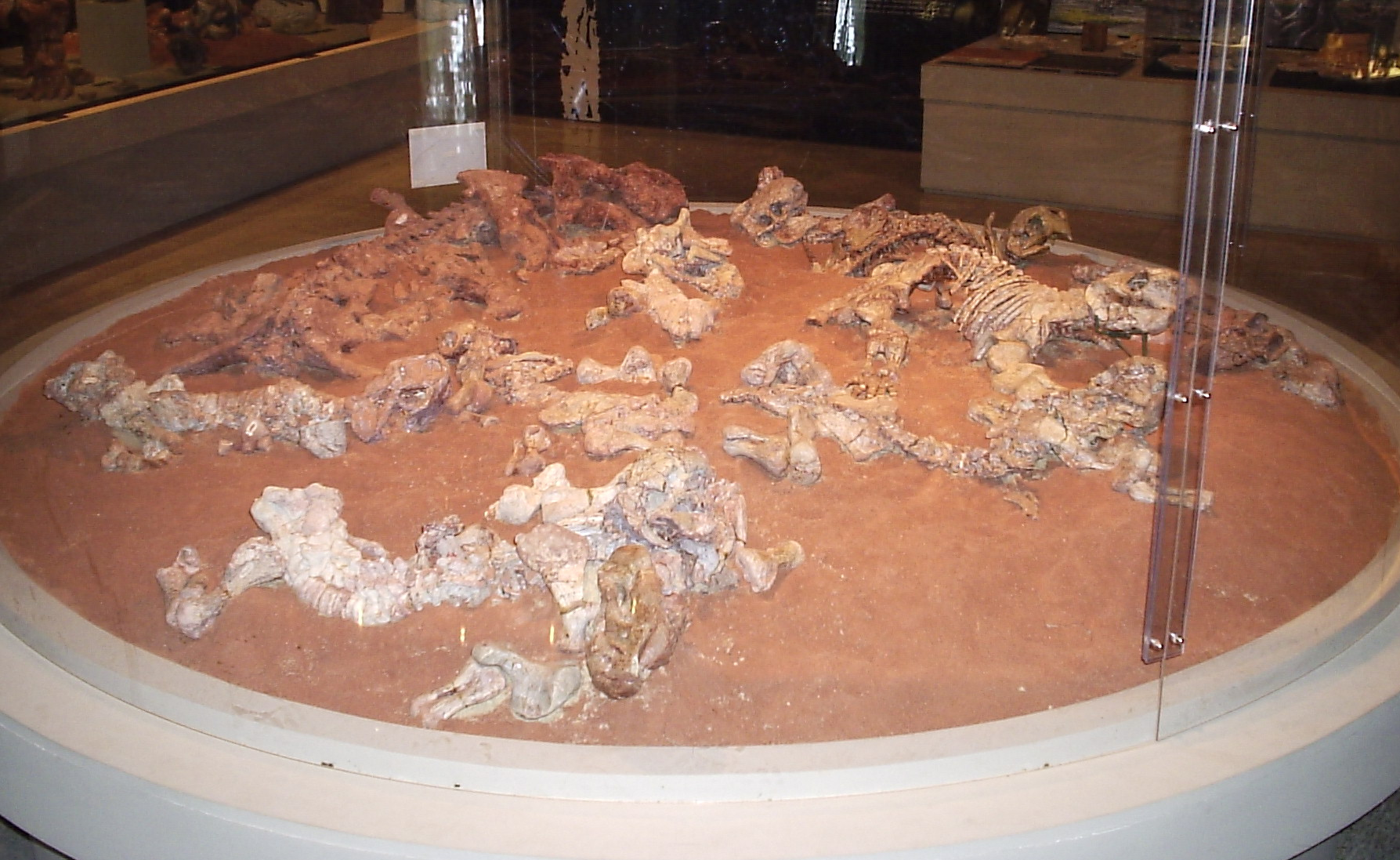 Dinodontosaurus Filhotes de dicinodonte UFRGS